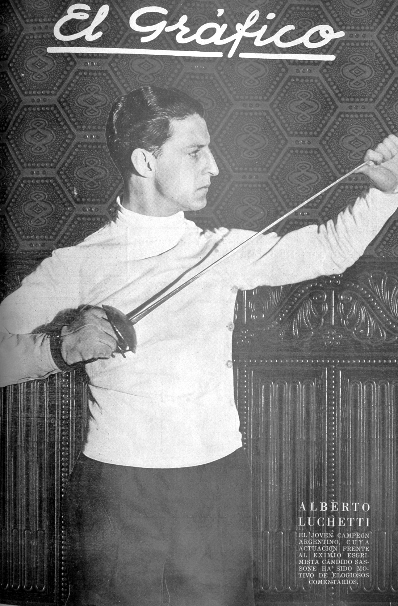 El Grafico del 30 de Octubre de 1926. Edicion 382